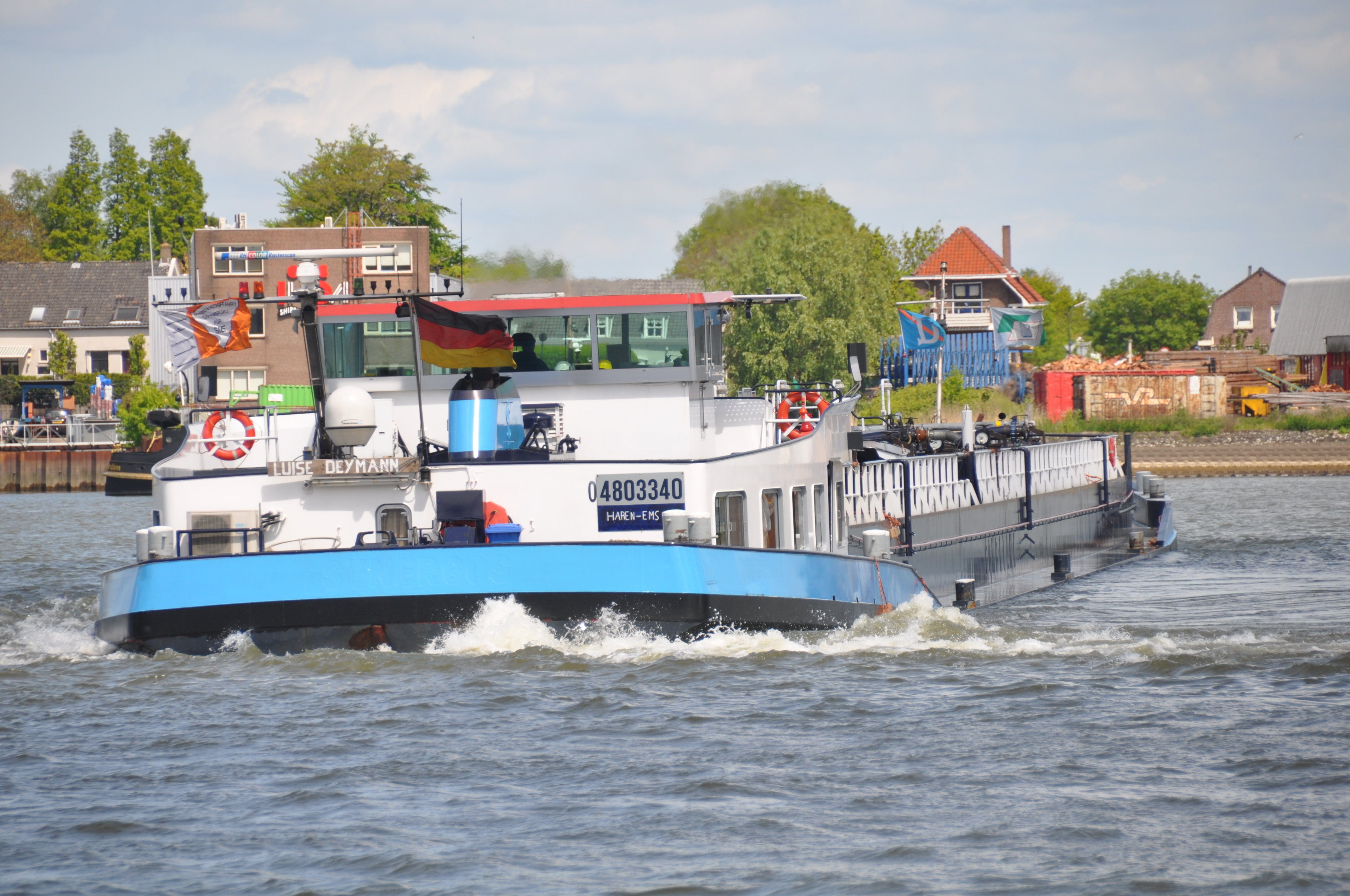 De LOUISE DEYMANN komt de Noord uit op de splitsing met de Nieuwe Maas en draait de Lek op.